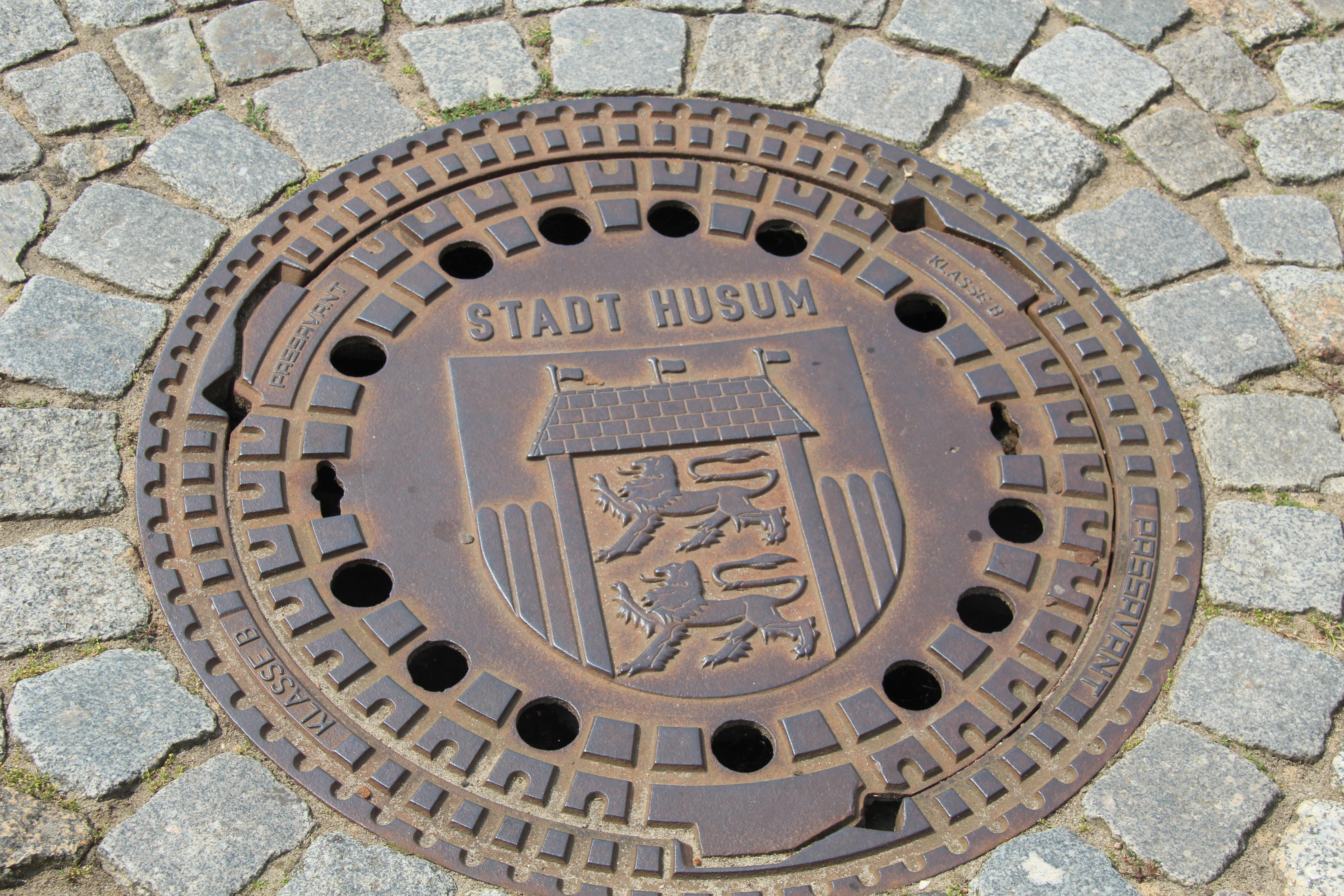 Kumlokk med byvåpenet til Husum